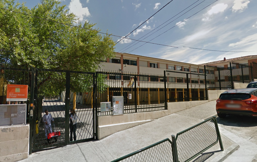 Colegio público Jerónimo Blancas y Tomás de Zaragoza, en el barrio de Valdefierro